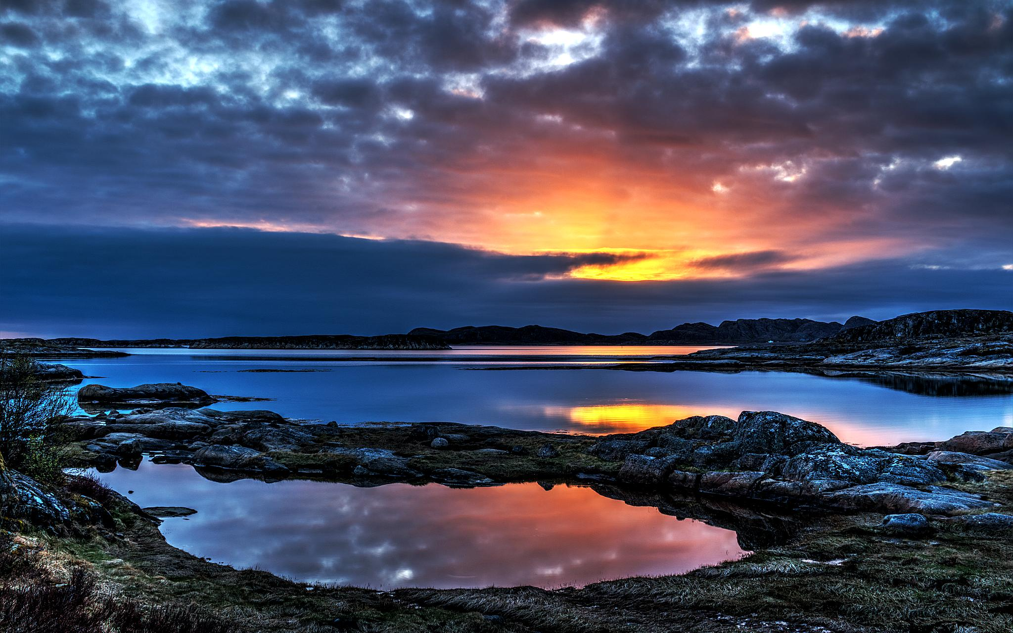 Solnedgang over skjærgården. Merket Småvollan, Vikna.